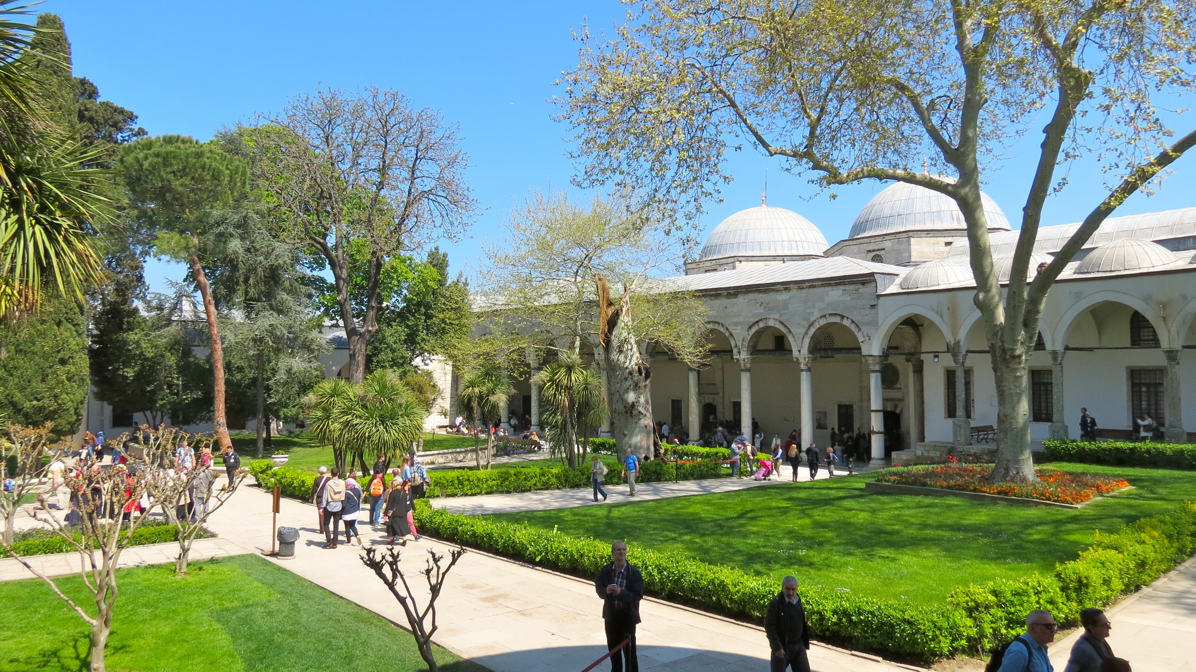 Tokpabi Palace